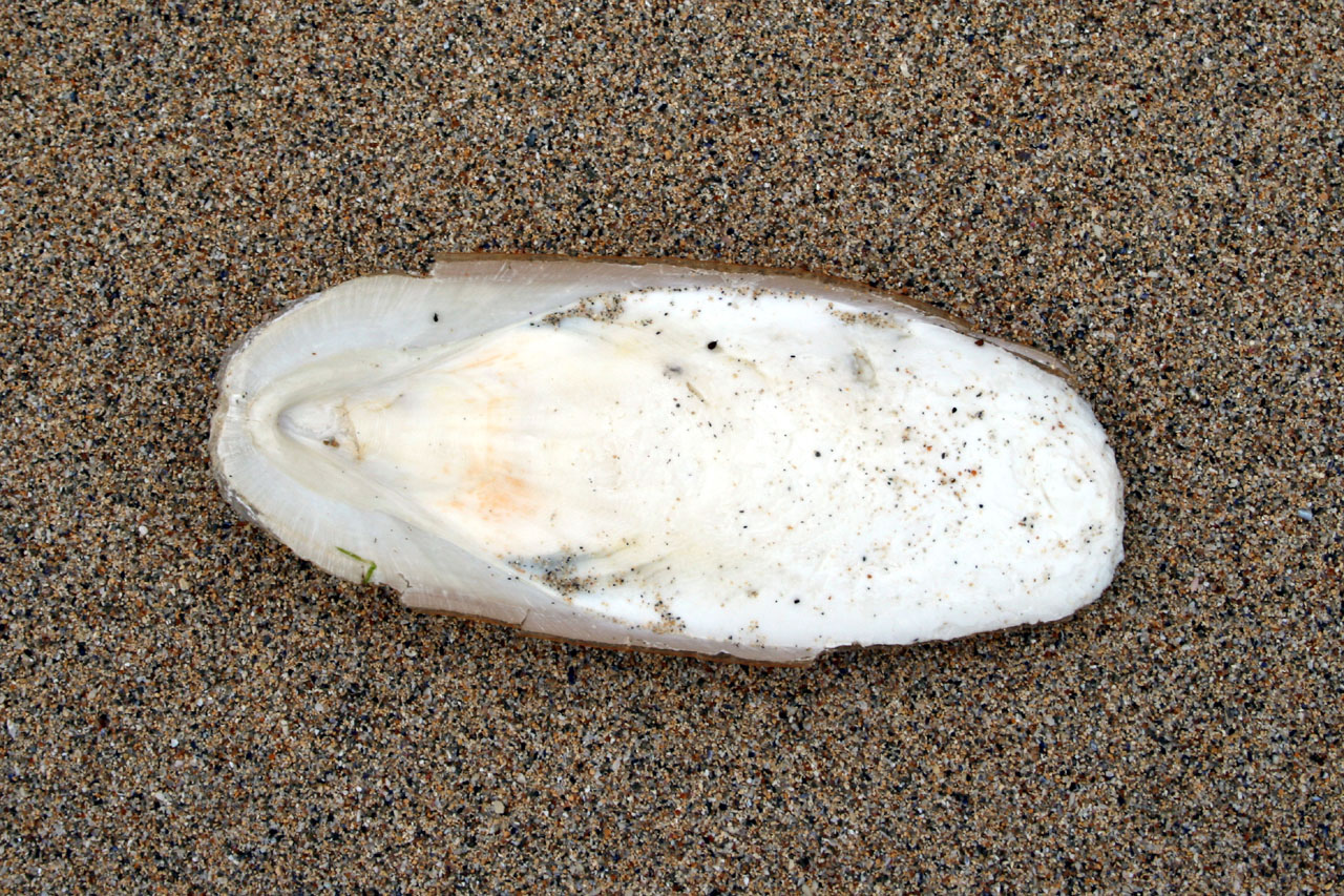 Os de seiche